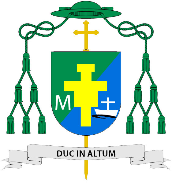 Biskup Antoni Bonifacy Reimann OFM, Boliwia